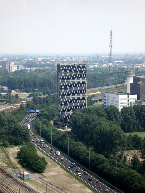 Zuidas